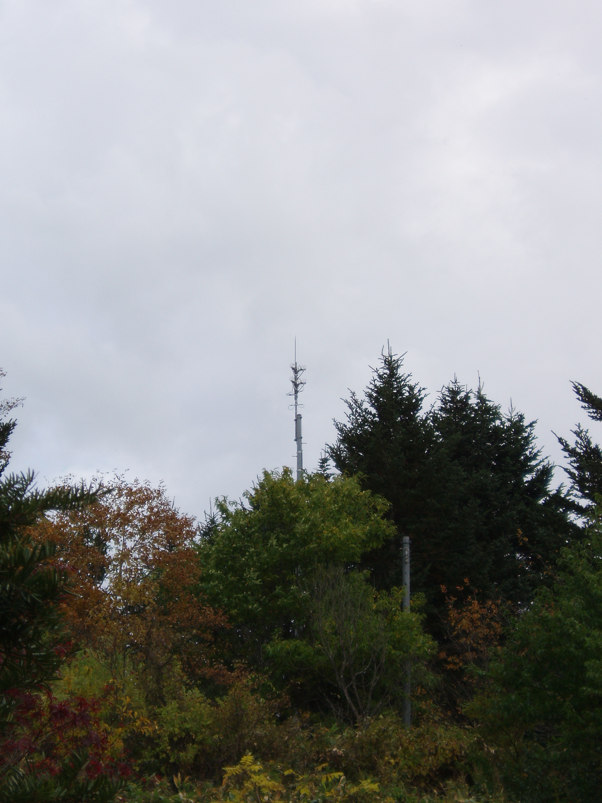 美唄我路中継局（遠景）